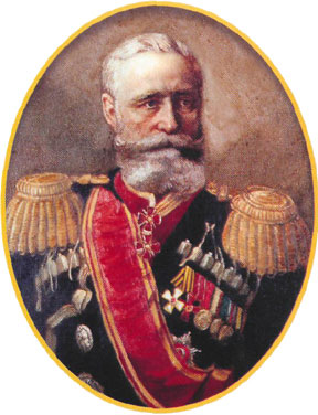 Яков Дмитриевич Малама (1841—1912) — генерал от кавалерии, наказной атаман Кубанского казачьего войска, командующий войсками Кавказского военного округа